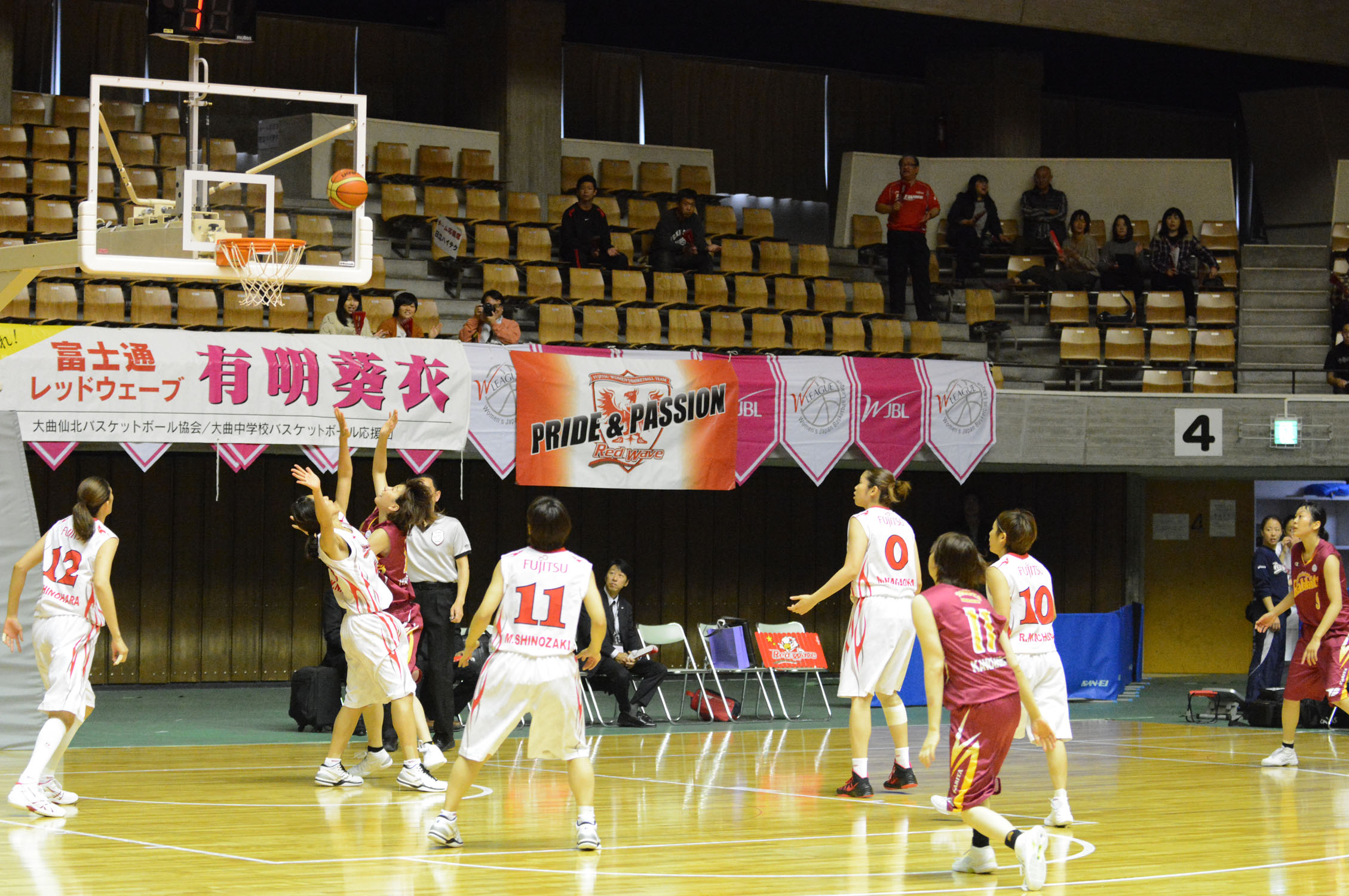 WJBL 14-15レギュラーリーグ、富士通レッドウェーブ対トヨタ紡織サンシャインラビッツ。秋田県立体育館。